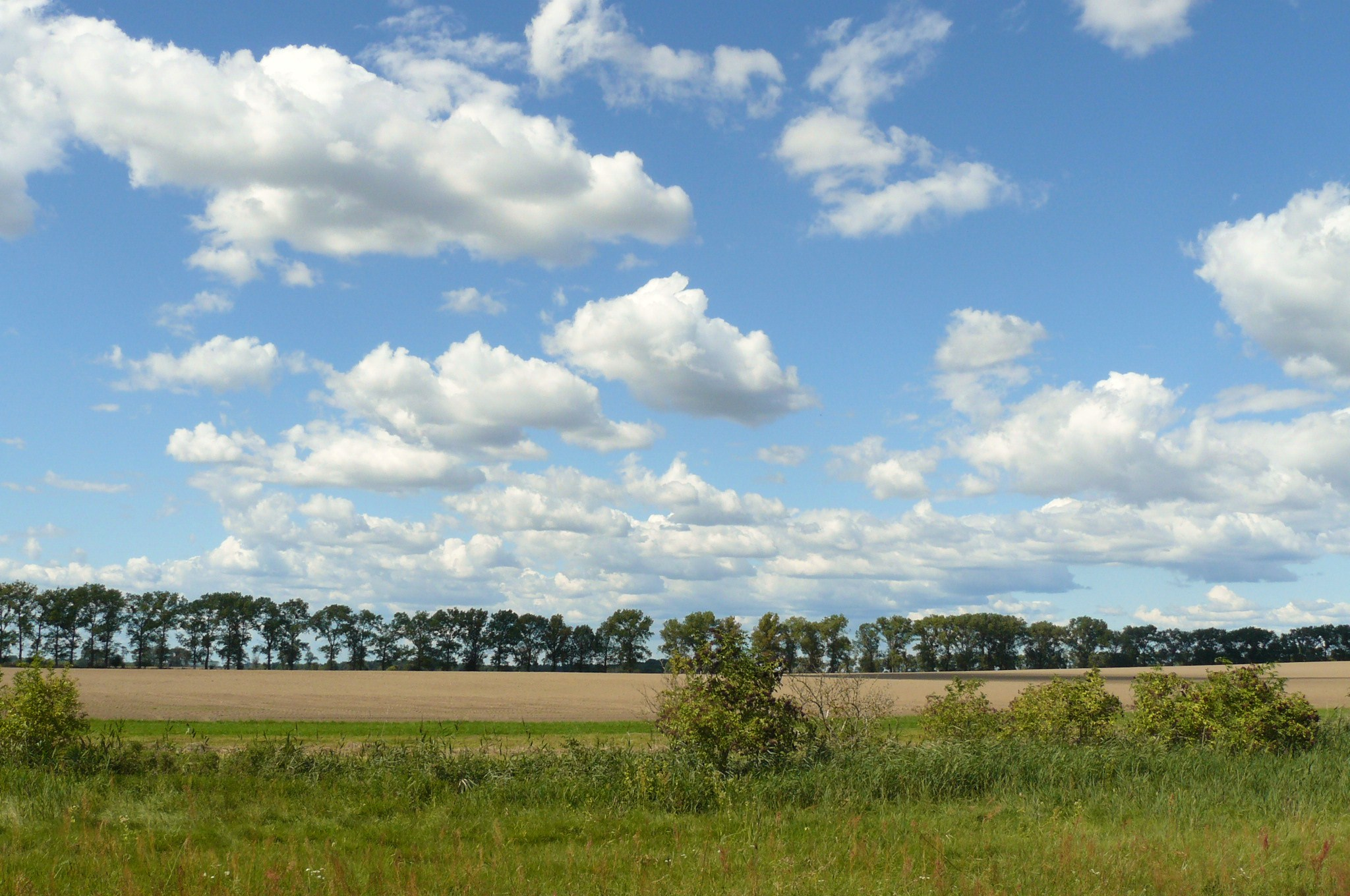 Pogranicze Poznania i gm. Suchy Las w rejonie Złotnik. Widok z terenu Poznania w kierunku gm. Suchy Las. Lato 2014r.